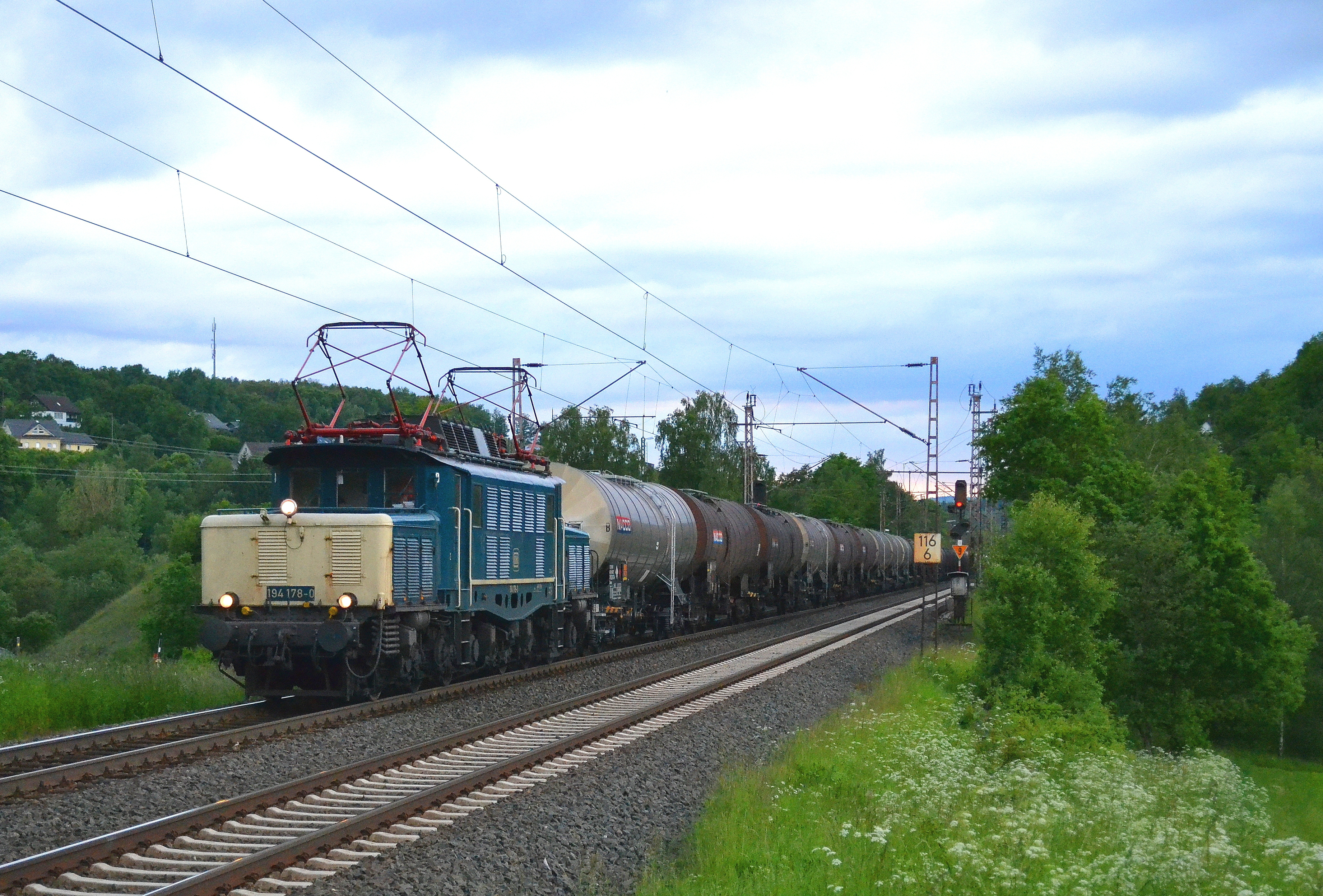 194 178-0 von Rail 4U mit einem Güterzug auf der Dillstrecke bei Rudersdorf.